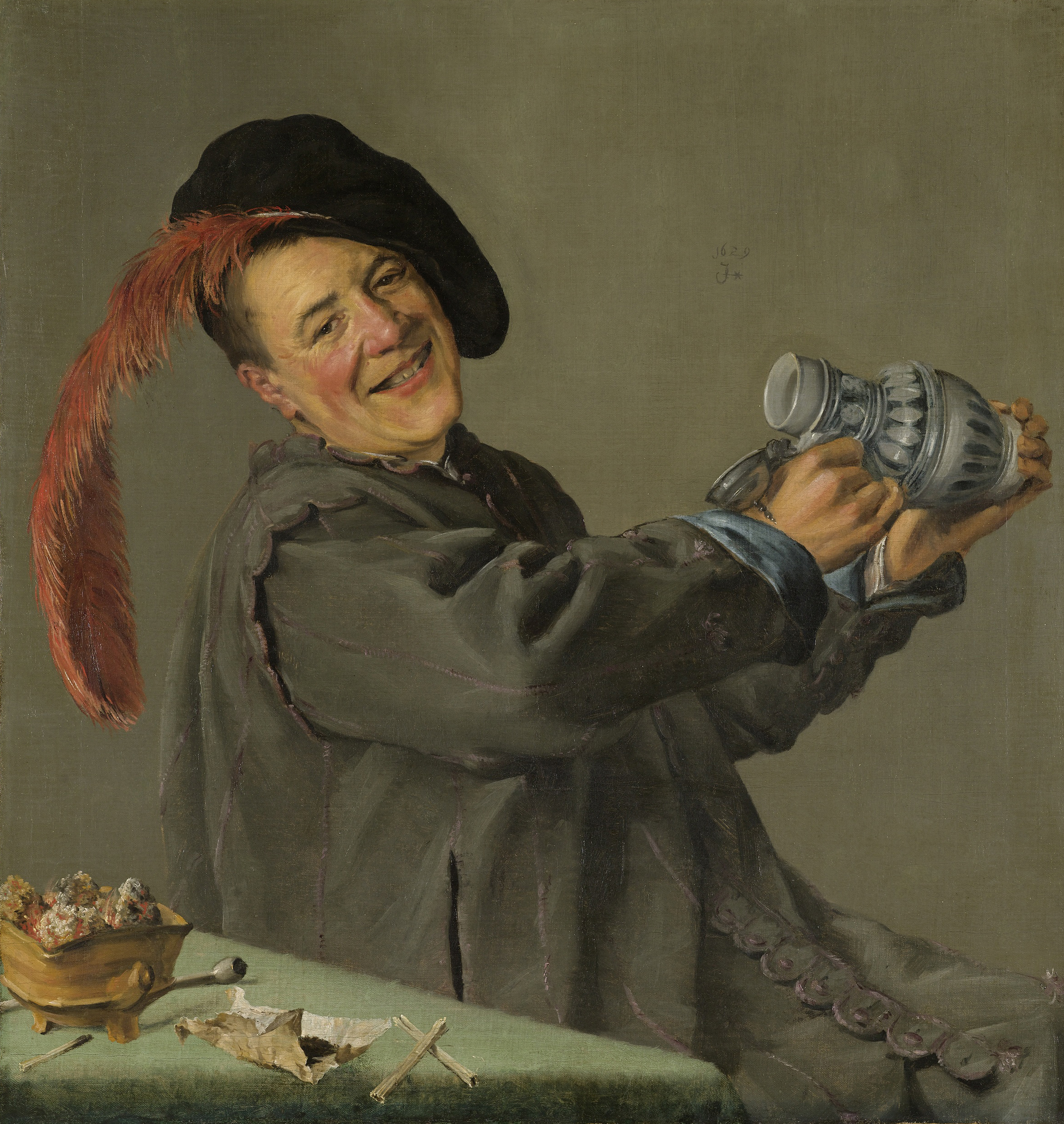 De vrolijke drinker. Een lachende man houdt een kruik met deksel omhoog. Met een gepluimde baret op het hoofd, zittend aan een tafel waarop een vuurtestje, pijp en tabak liggen.